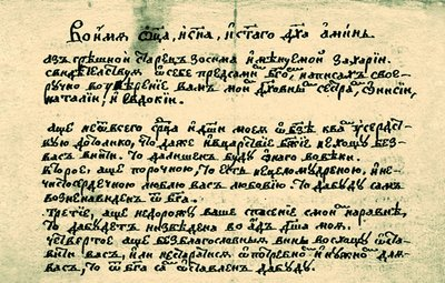 Автограф прп. Зосимы (Верховского). Заветные письма (письмо от 2 февр. 1819 г.) (архив Зосимовой пуст.)